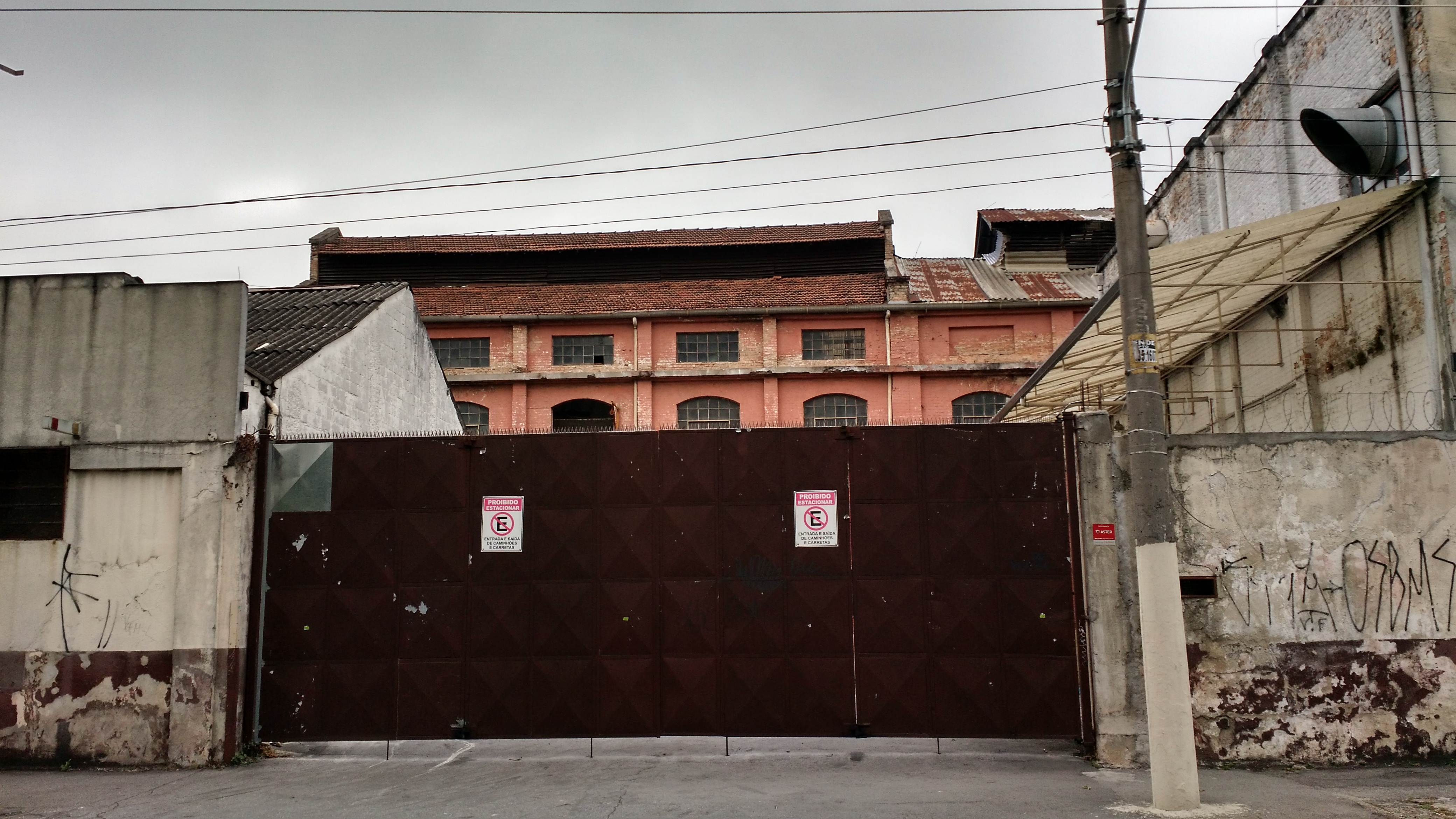 Área externa dos Moinhos Minetti Gamba